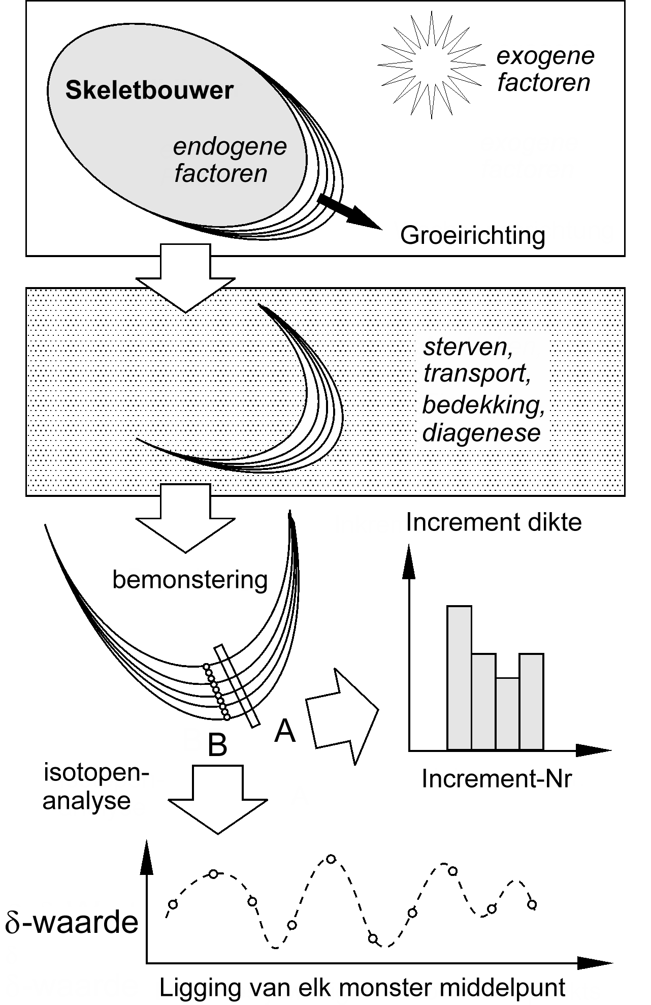 Sclerochronologie - Schematische voorstelling van de methode